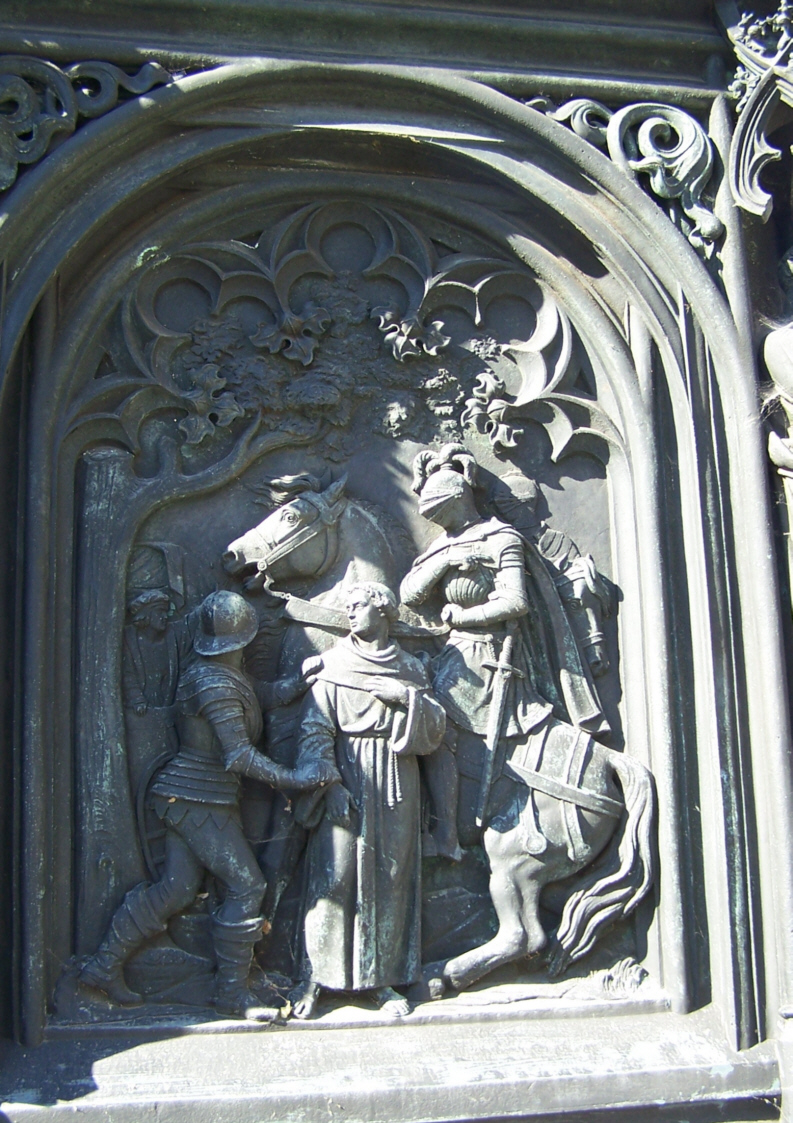 Motivtafel Luthers Gefangennahme am Denkmal in Möhra.